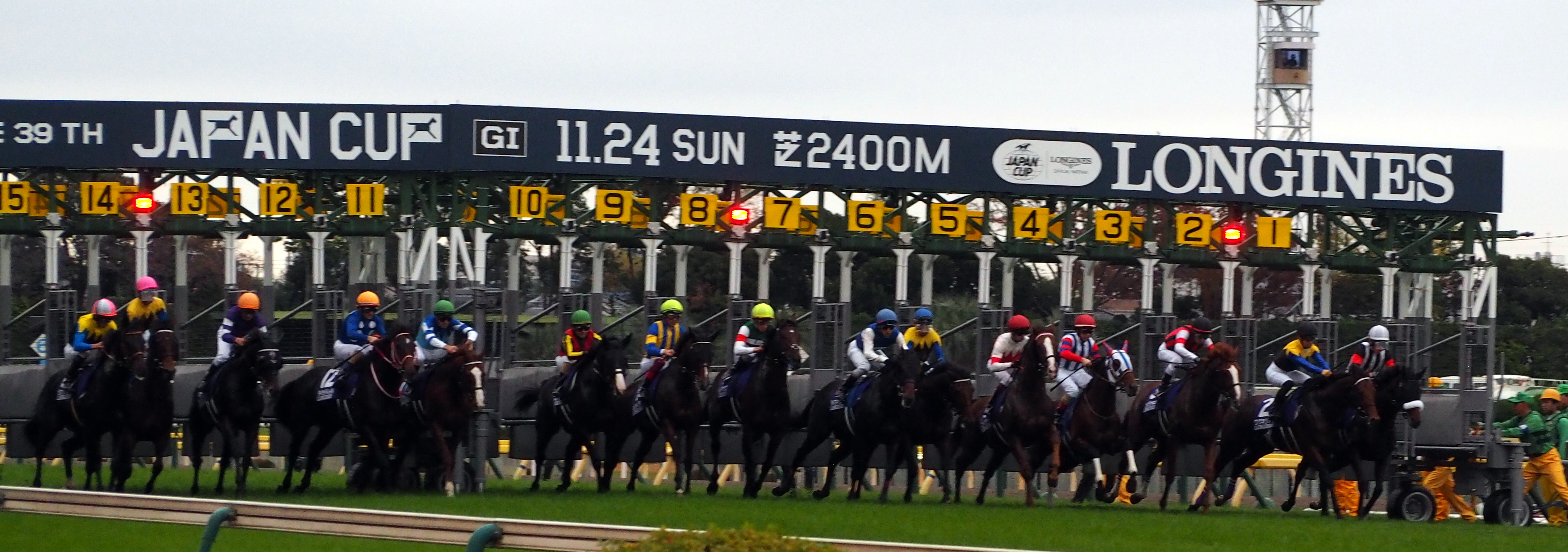 2019年のジャパンカップ、スタートする15頭